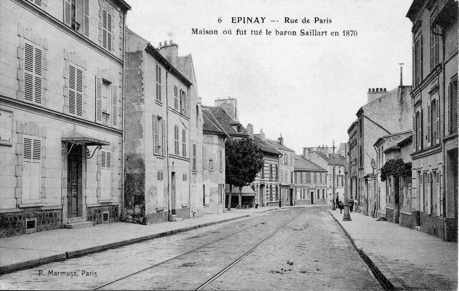 Épinay-sur-Seine: Rue de Paris, lieu de la mort du Baron Saillart